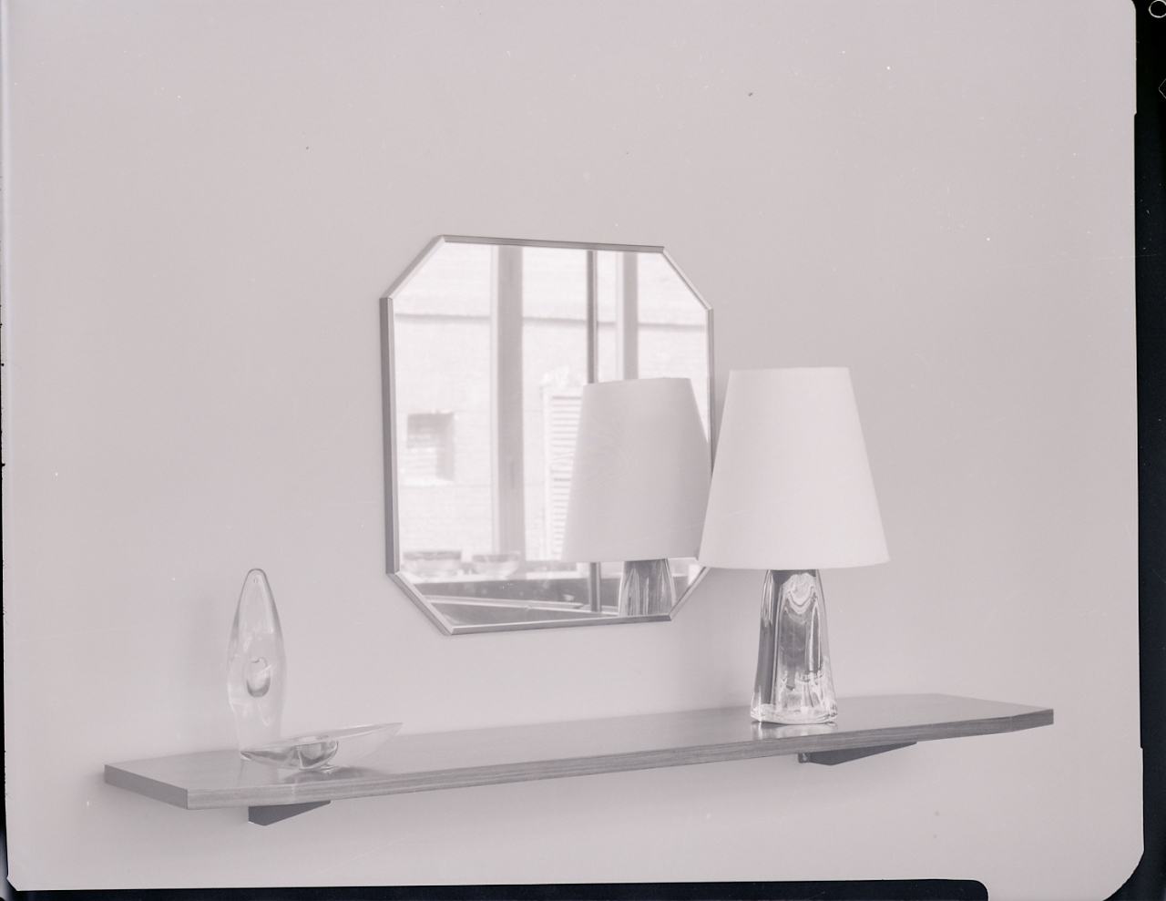 Servizio fotografico : Italia, 1963 / Paolo Monti. - Buste: 2, Fototipi: 2 : Negativo b/n, gelatina bromuro d'argento/ pellicola ; 10x12. - ((Serie costituita da 2 buste sciolte di negativi identificati con una doppia numerazione (da 45210 a 45218): 25100, 25118. - La doppia numerazione potrebbe corrispondere ai lavori realizzati durante il periodo di attività del laboratorio e studio fotografico "Foto Studio 22", società che risulta essere stata aperta il 10/04/1961, con partecipazione, nel ruolo di gerente, di Vincenzo Carrese. - Fonte: Rubrica di Paolo Monti: Archivio fino 1-4-1961/ 31-3-1963 (1961-1963), presso Archivio Paolo Monti